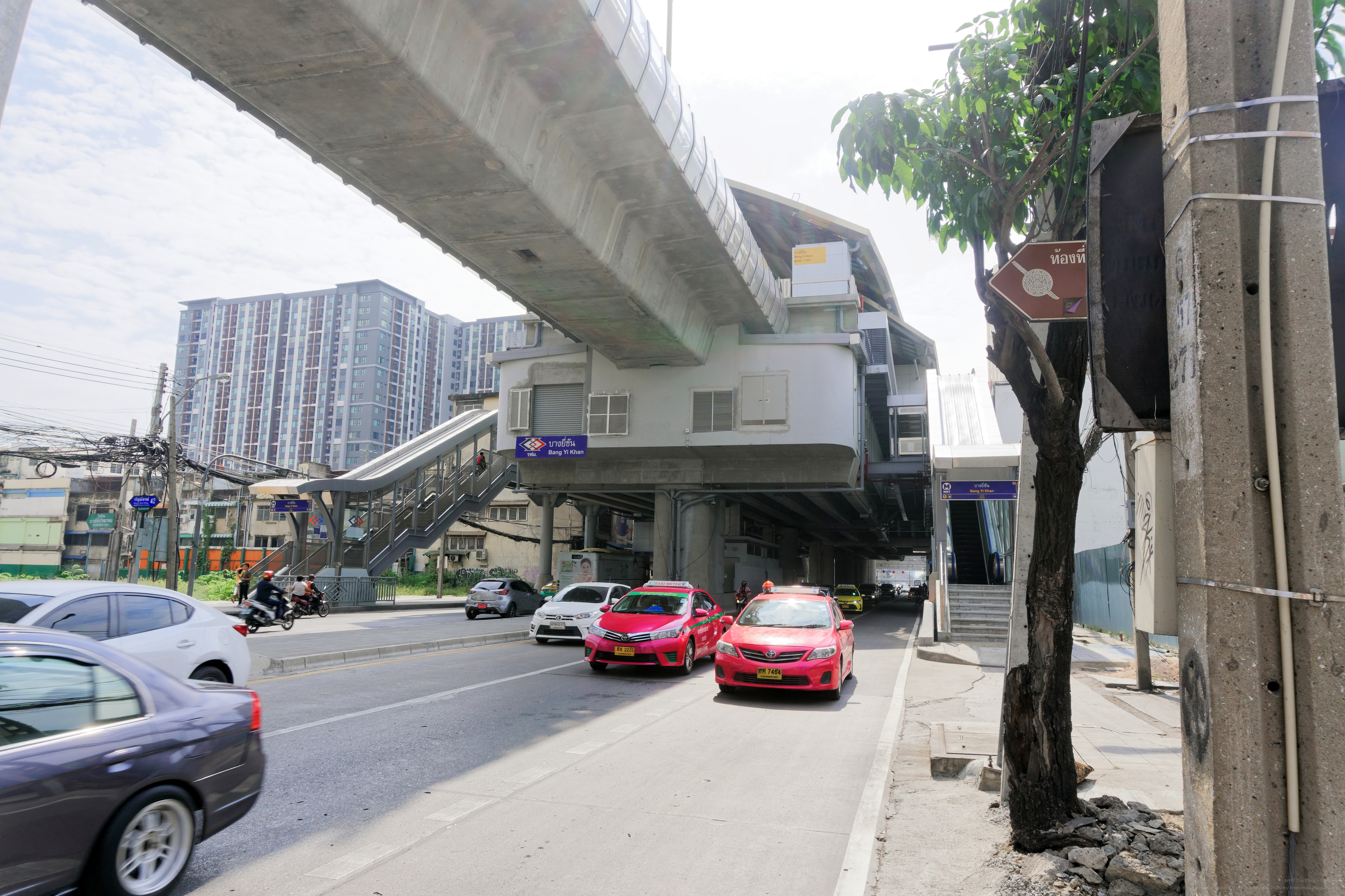 MRT Bang Yi Khan – Station